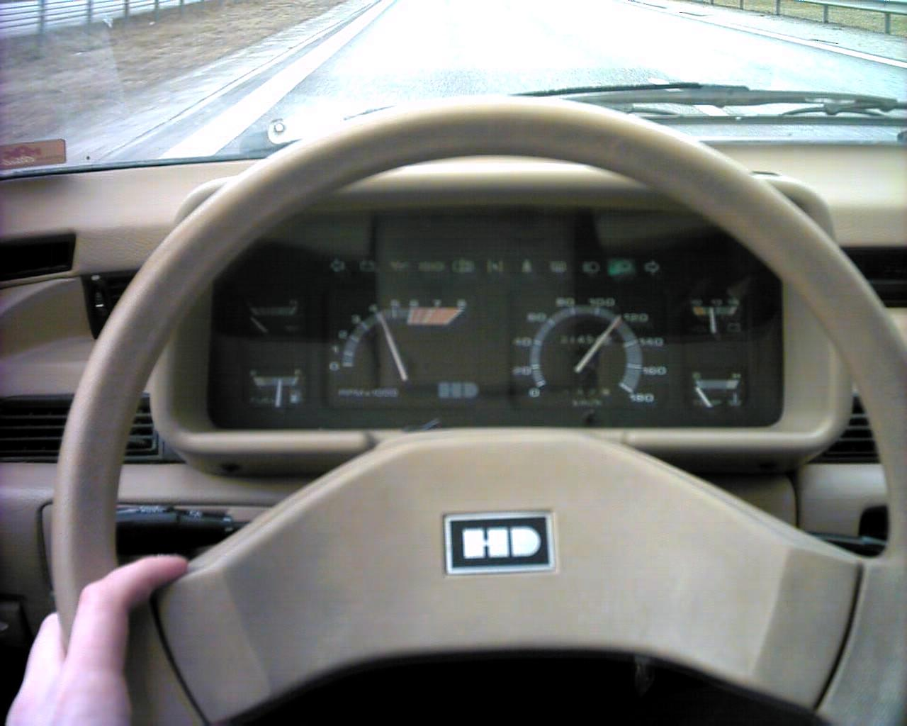 Hyundai Stellar dashboard. Photo taken by User:Boivie in Jönköping 7 April 2006